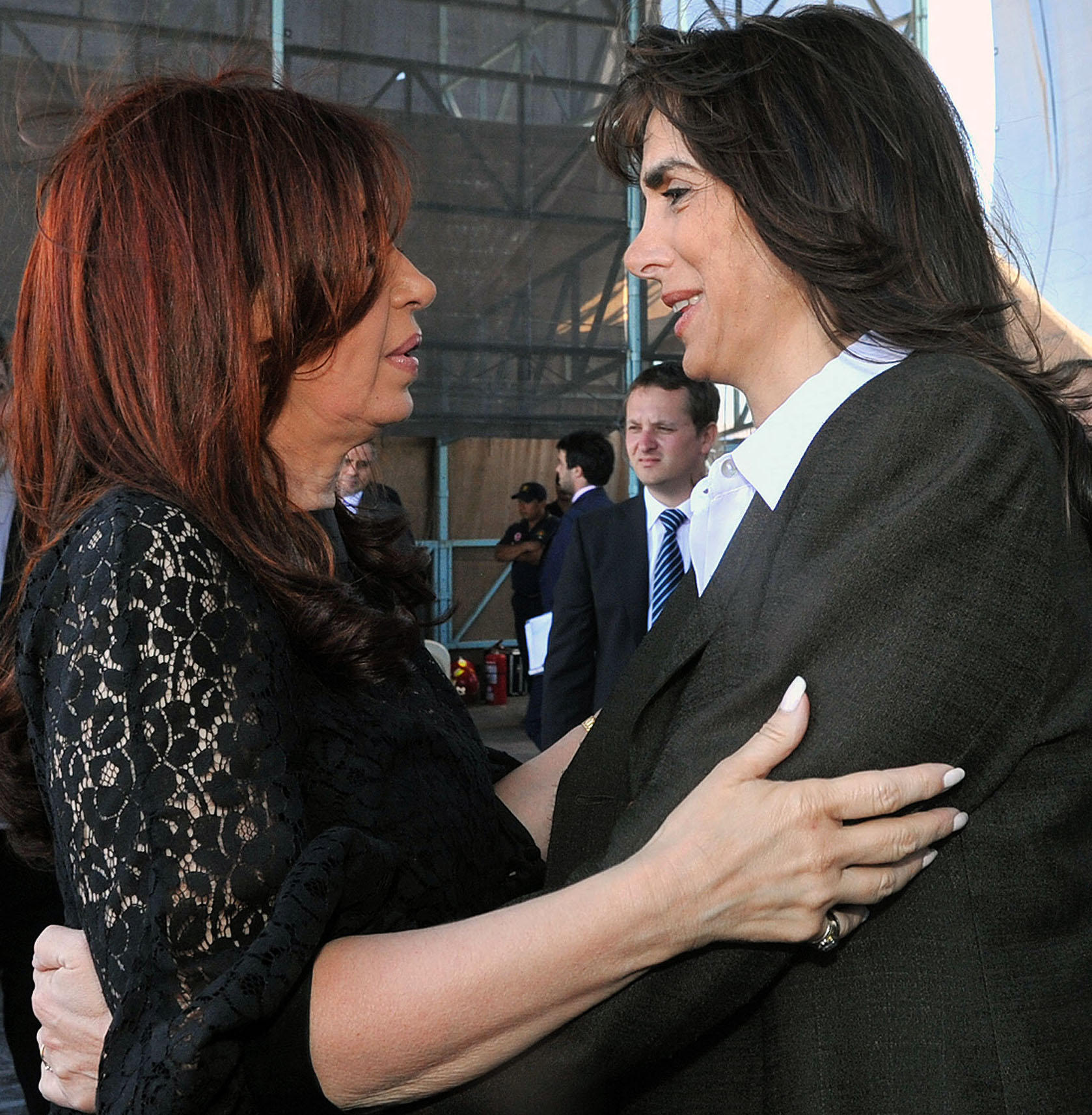 La Presidenta junto a la diputada provincial electa María Eugenia Bielsa, en la muestra agroindustrial de Las Parejas, Santa Fe